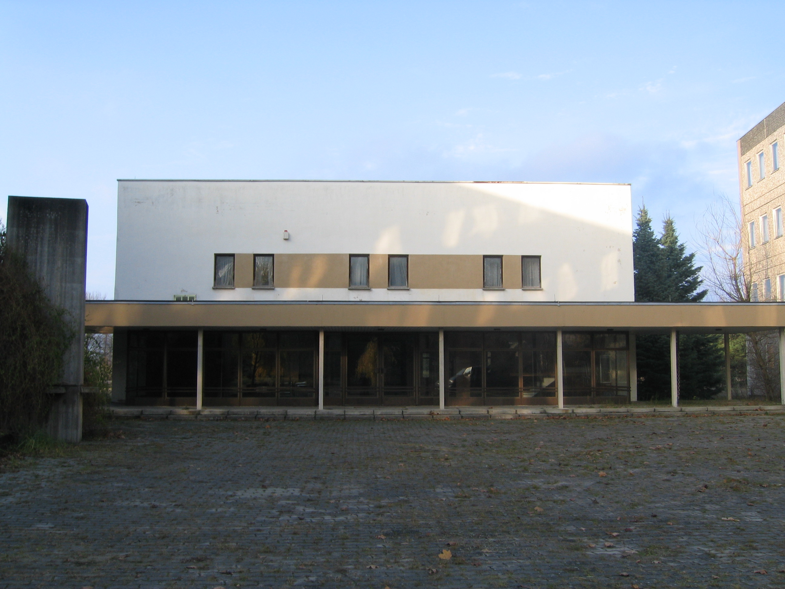 MfS Hauptverwaltung Aufklärung Gosen, Kinosaal von Aussen, 2009